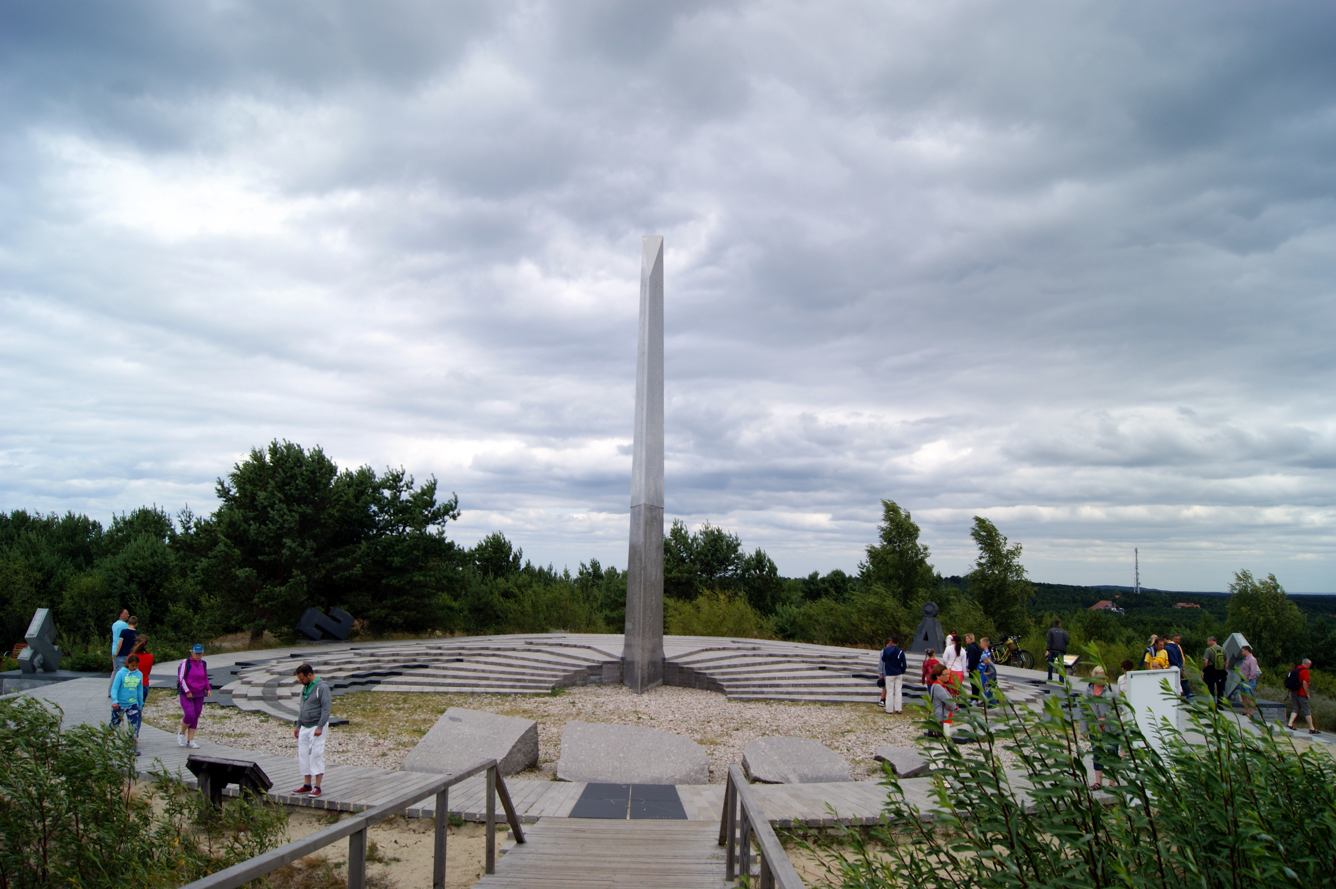 Sonnenkalender auf der Grossen Düne bei Nida, Litauen